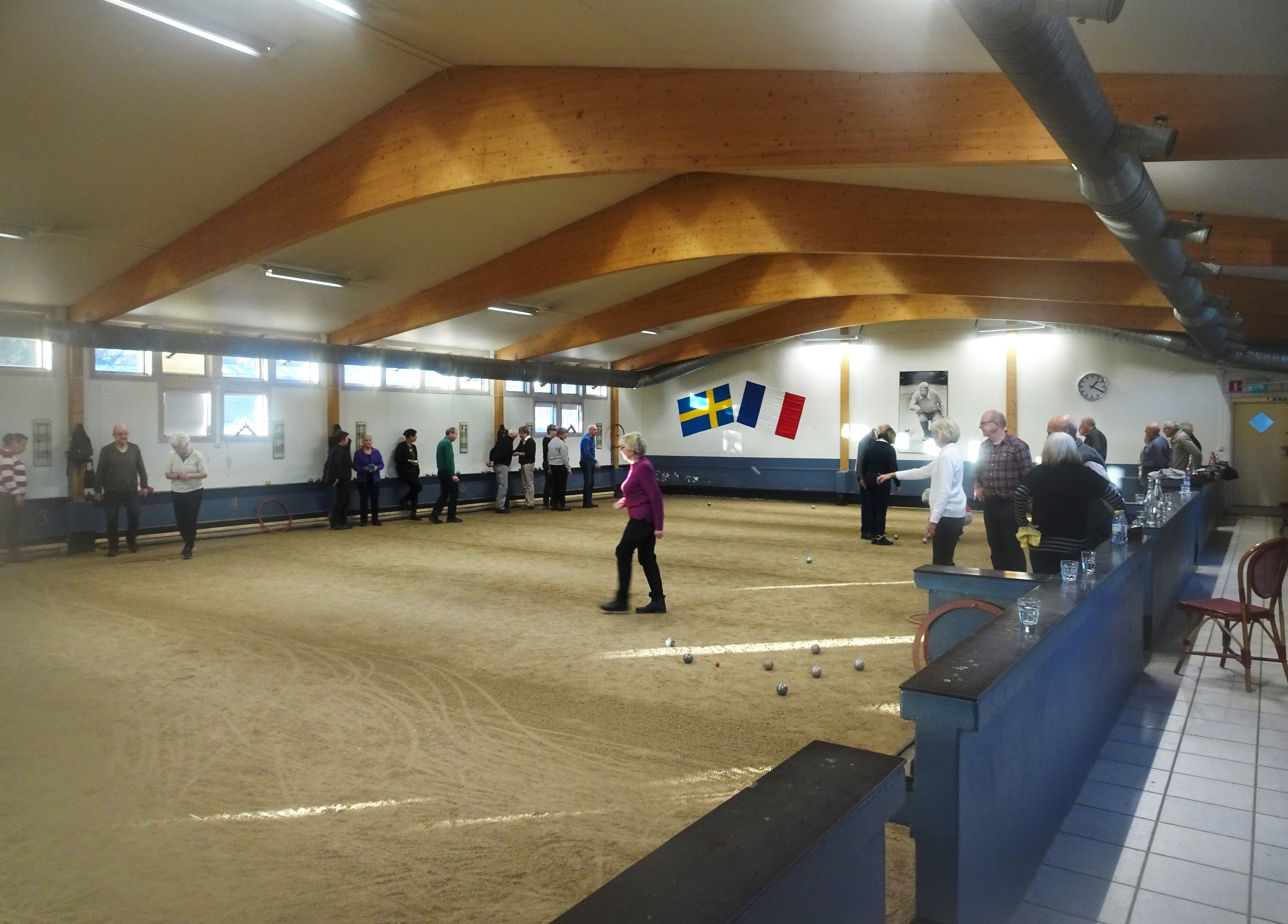 Prins Bertils Boulehall på Rosendal, Djurgården, Stockholm